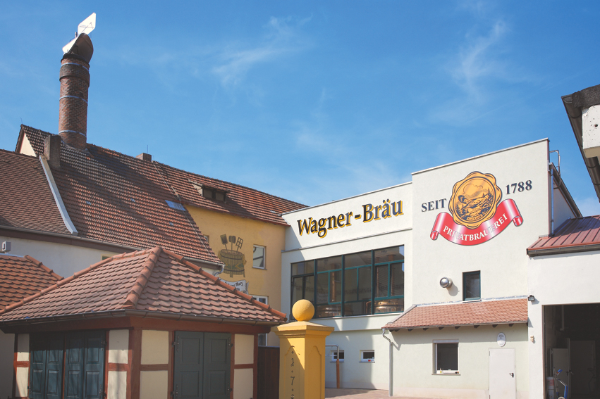 Außenansicht der Brauerei Wagner in Kemmern.